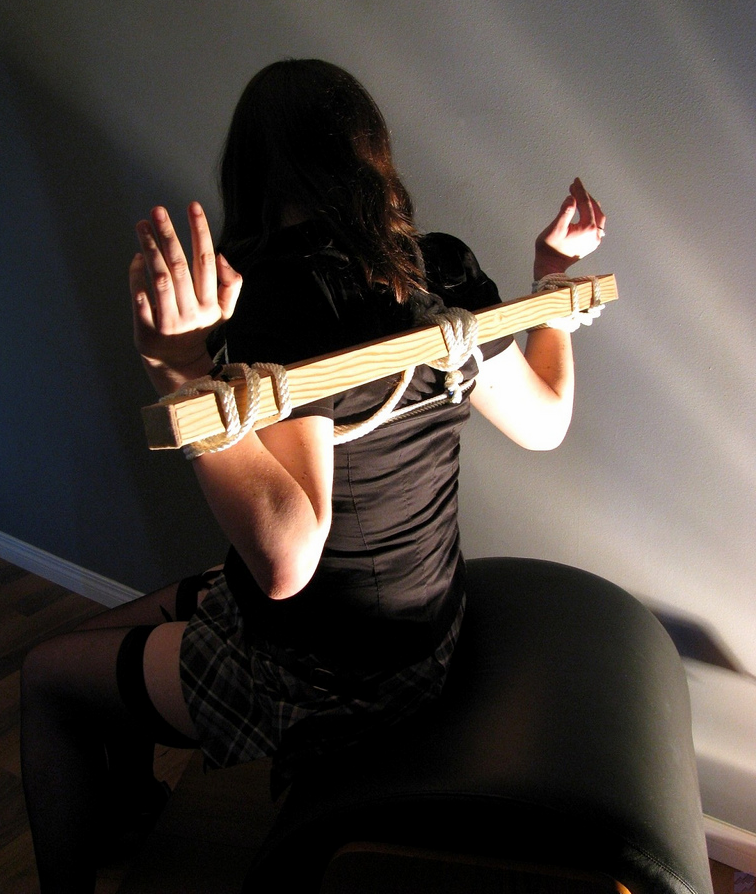 Shibari "stick", plaid skirt, nylons